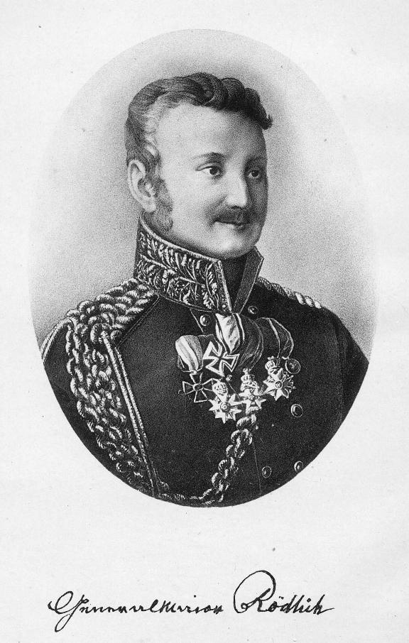 Hieronymus Franz Seraph Roedlich (* 30. September 1767 in Brünn (Mähren); † 24. Dezember 1833 in Berlin) war königlich preußischer Generalmajor